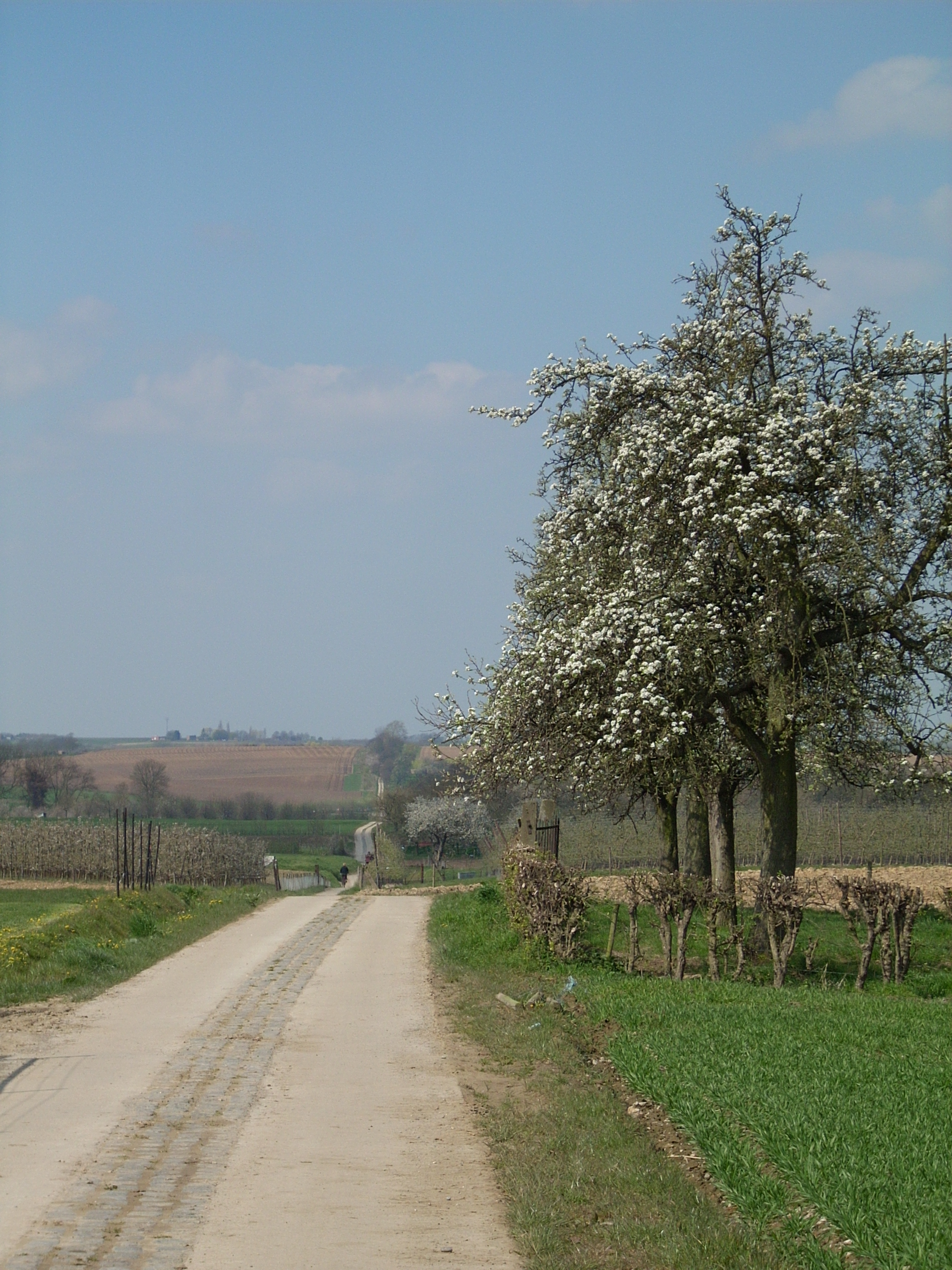 Romeinse Kassei van Tongeren tot Tienen